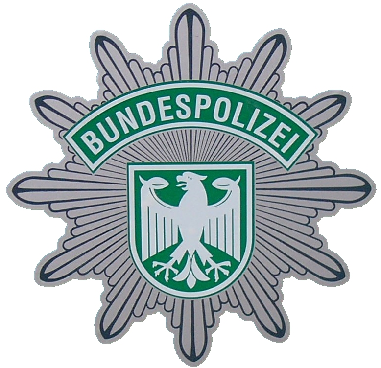 Polizeistern der Bundespolizei (Deutschland) Klebefolie an Dienst-KFZ